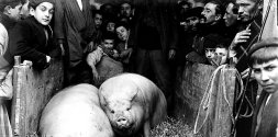 Arabar edo Gasteizko muturmotz txerriak azoka batean. 1915. urtean